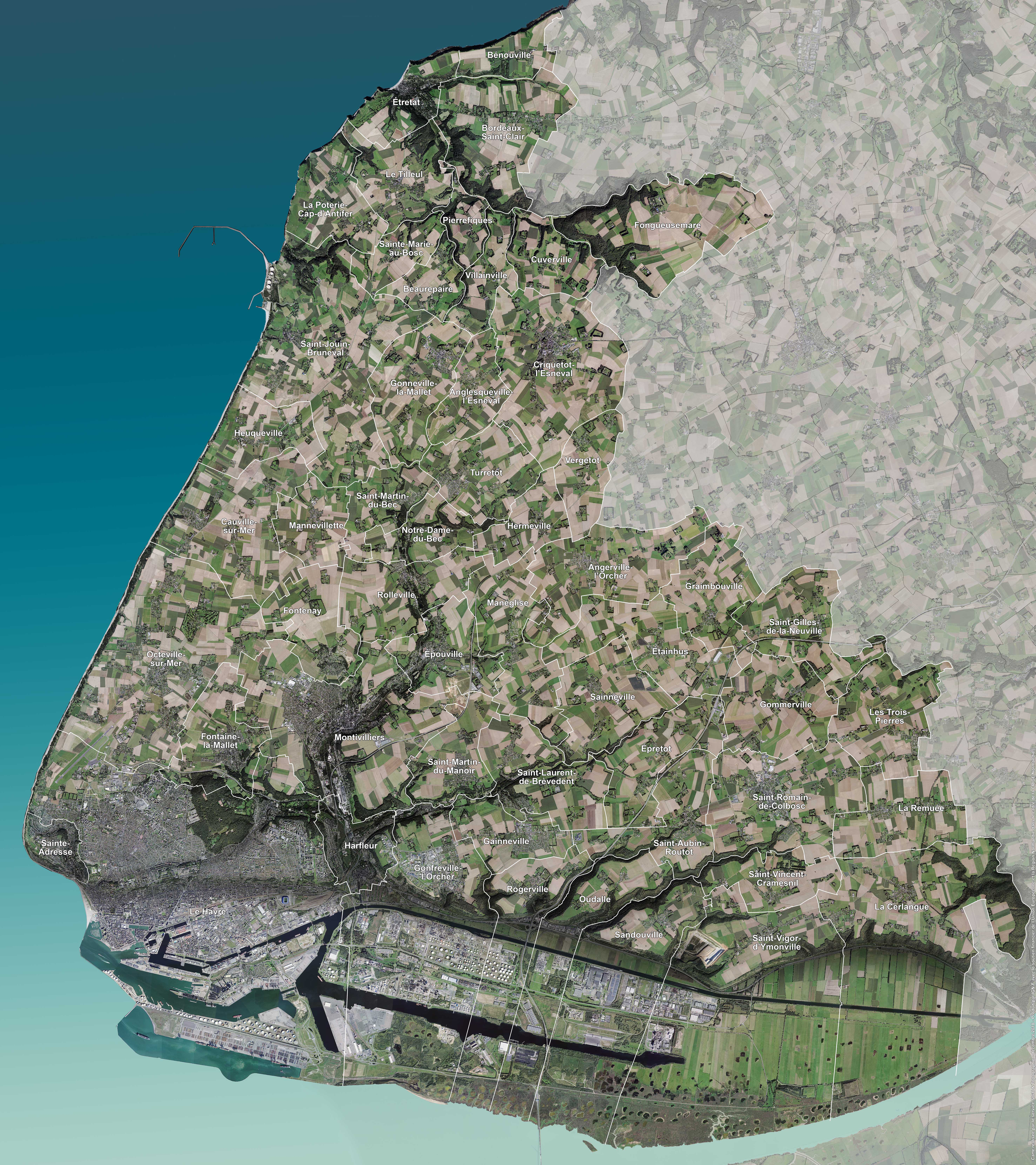 Carte de la communauté urbaine Le Havre Seine Métropole